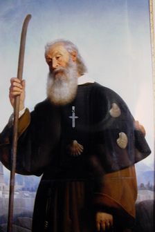 Tableau d'Eloy Chapsal, musée d'Aurillac